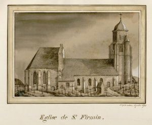 Eglise de St-Firmin, 1850, Oswald Macqueron.